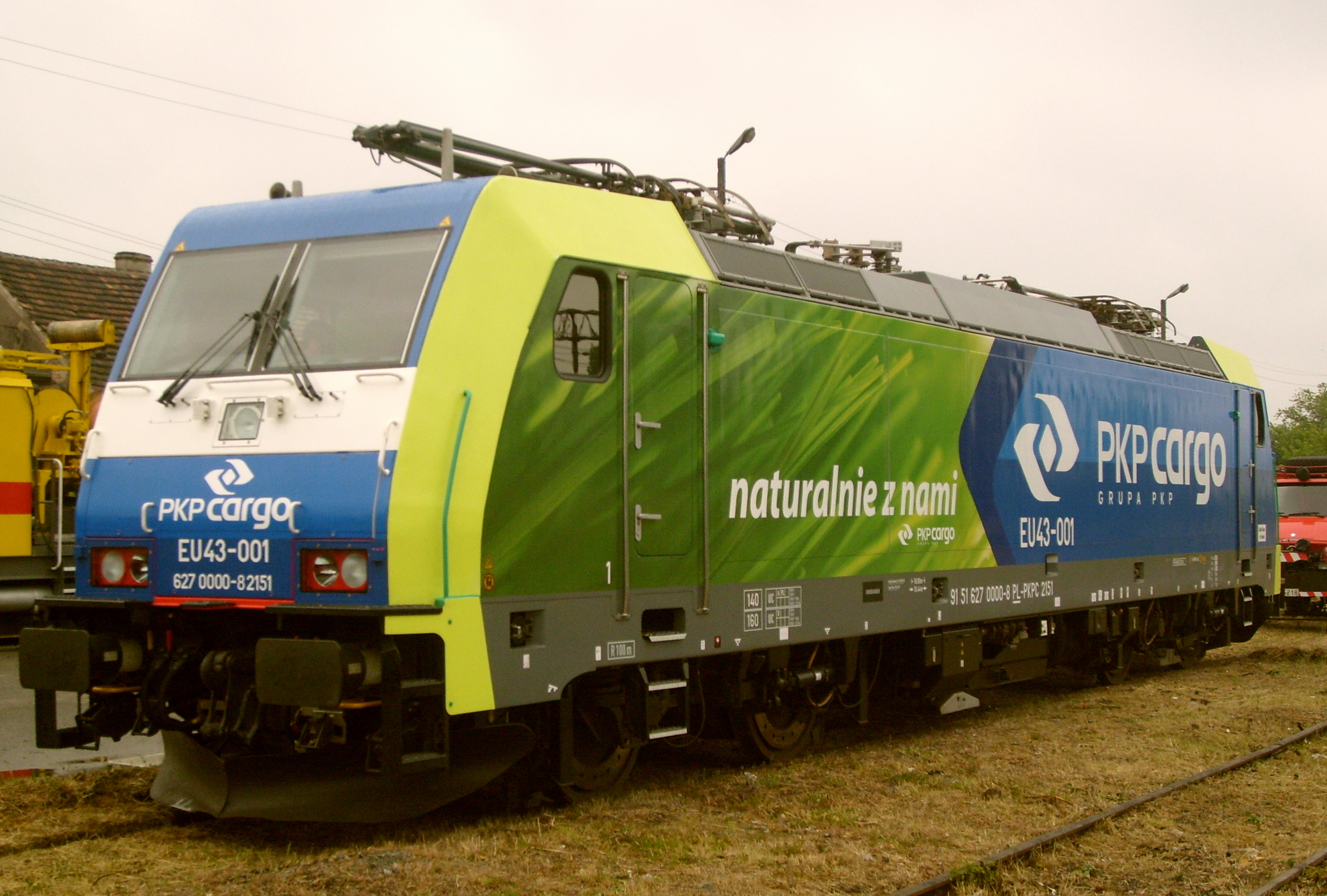 EU43-001 na bocznicy w Zielonej Górze w czasie Dni Techniki Kolejowej 2008